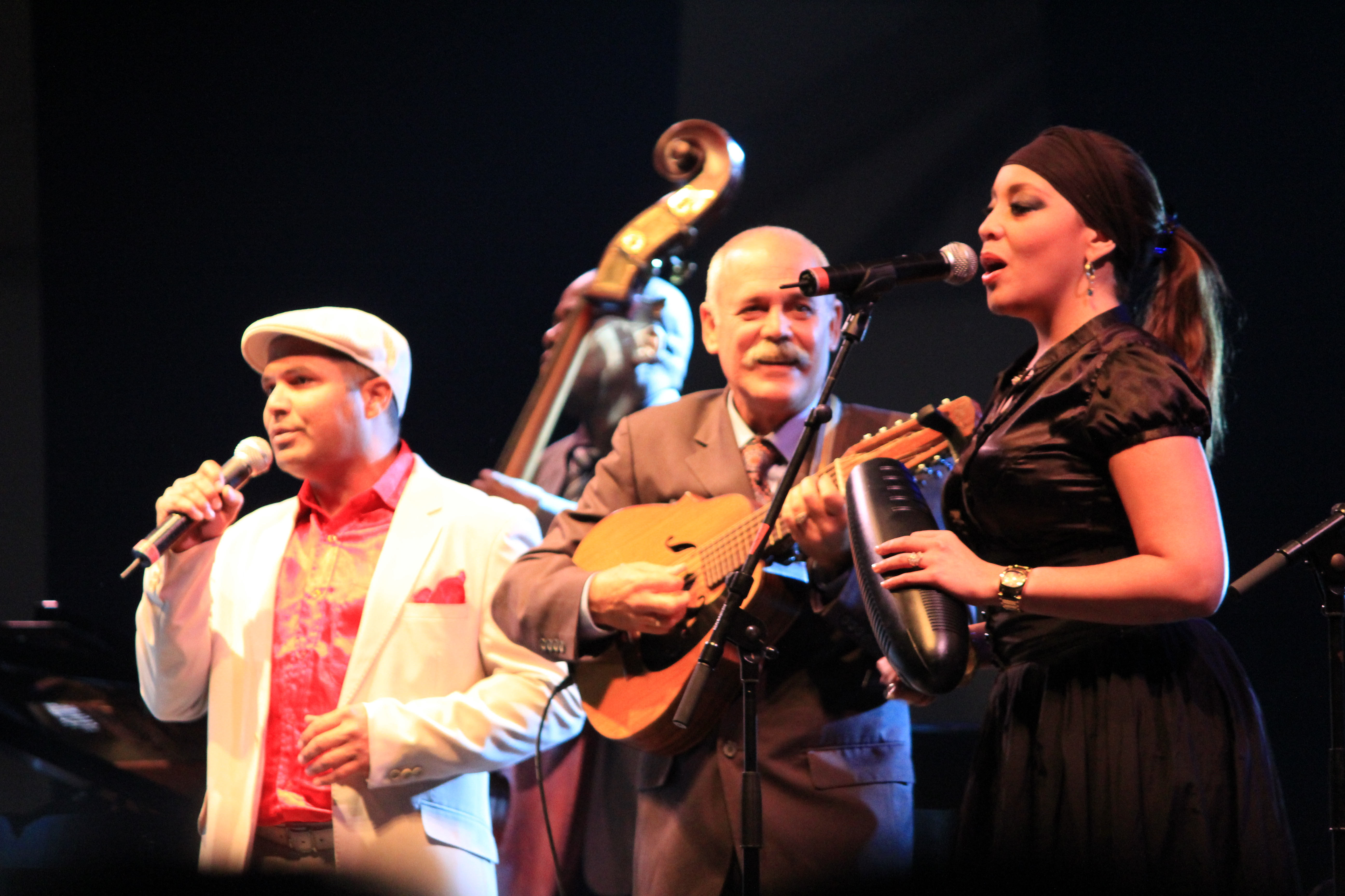 Orquesta Buena Vista Social Club pendant le Festival interceltique de Lorient, avec Barbarito Torres